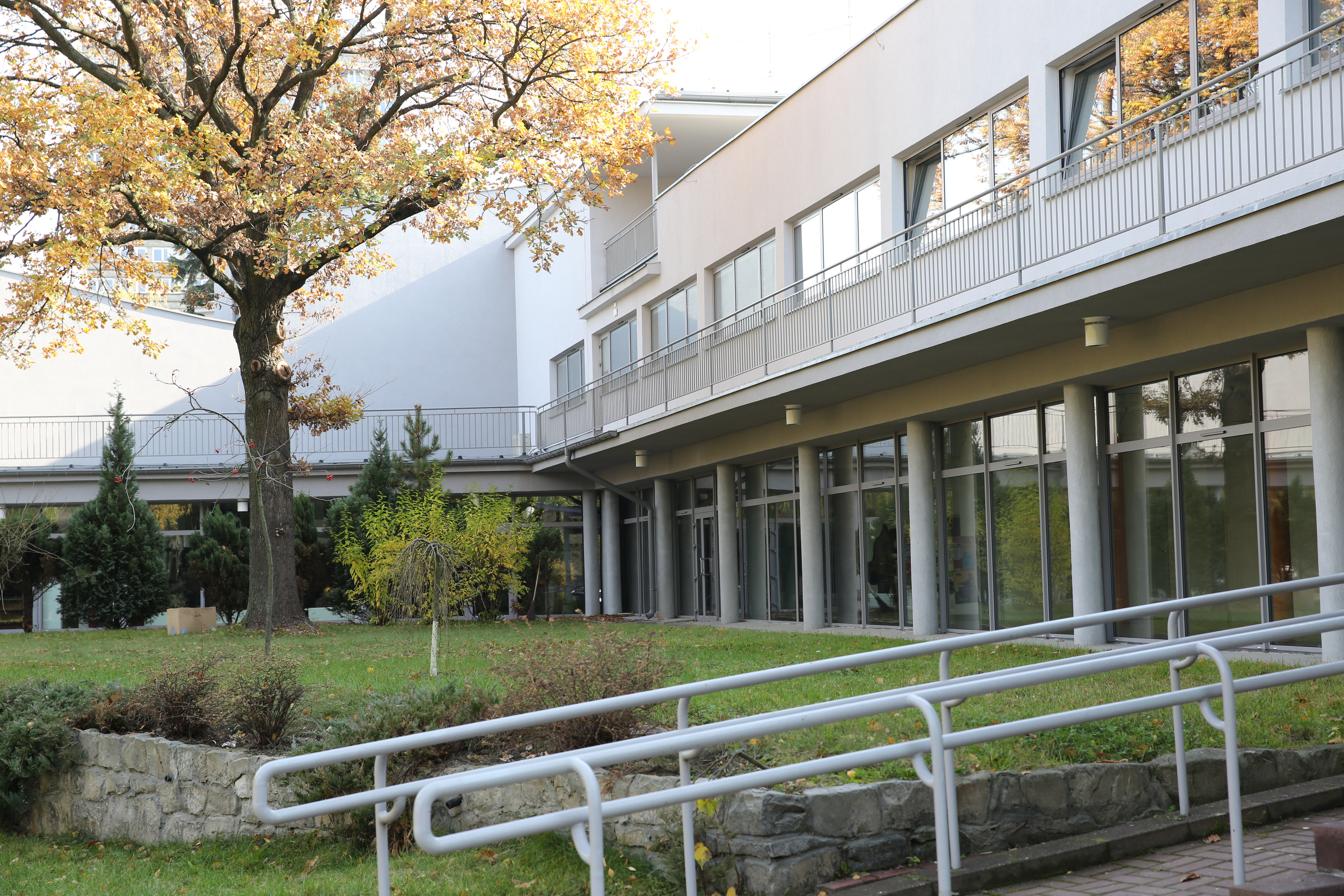 Budynek Akademickiego Centrum Kultury UMCS Chatka Żaka